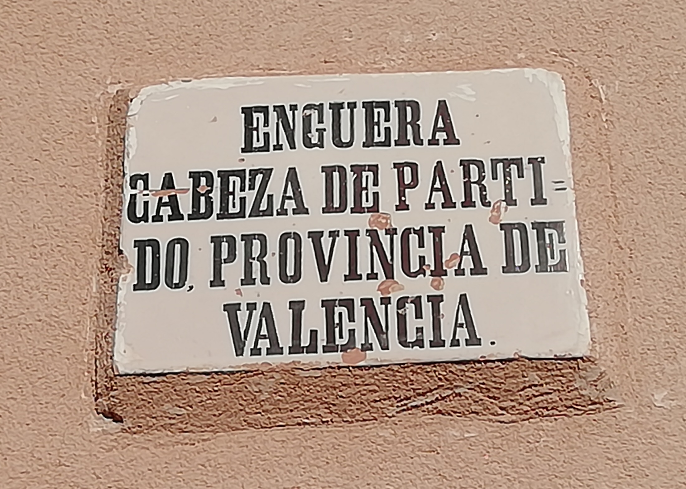 Placa cerámica localizada en una fachada de la calle San Jaime de Enguera